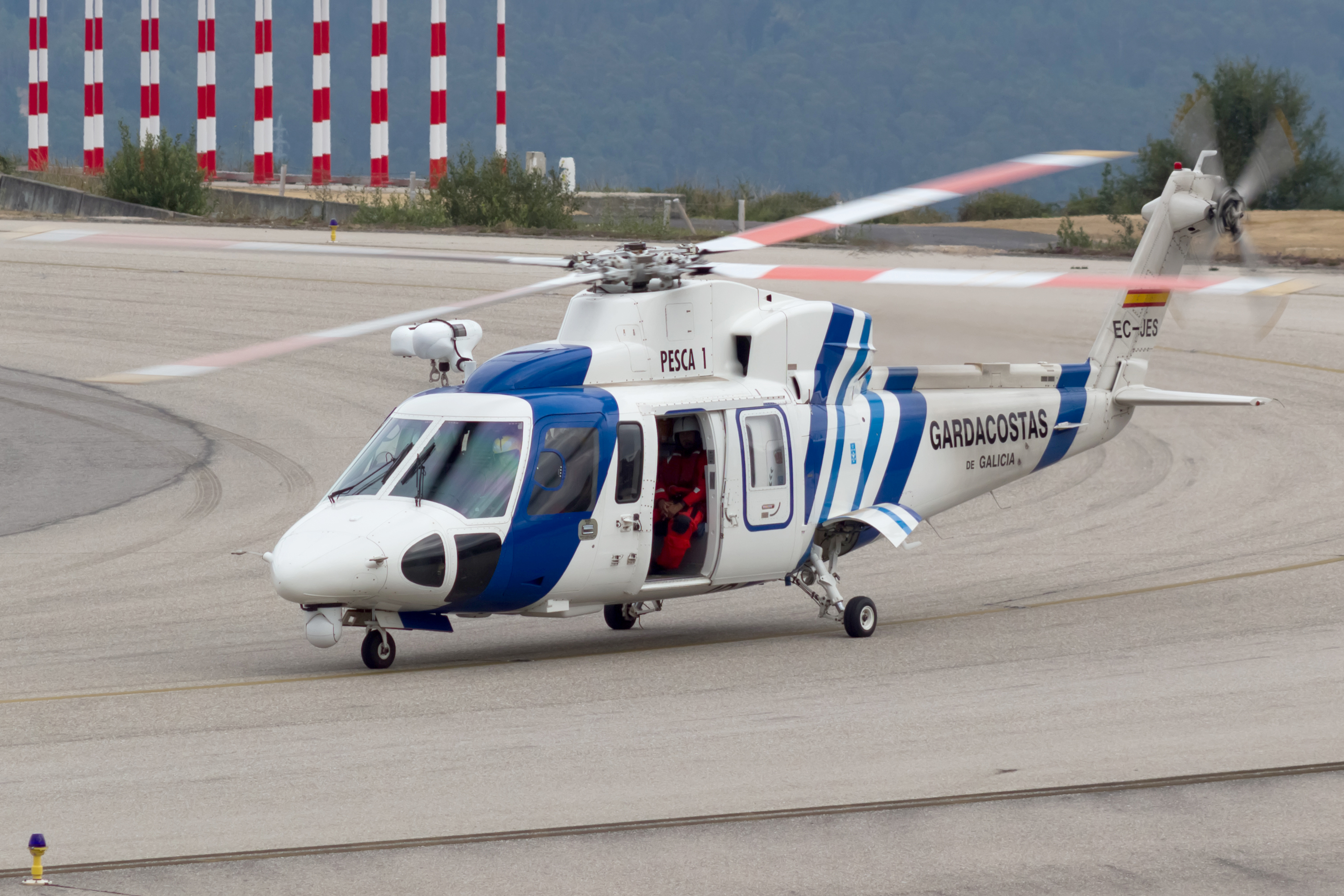 Sikorsky S-76C do servizo de Gardacostas da Xunta de Galicia tras aterrar no aeroporto de Vigo.